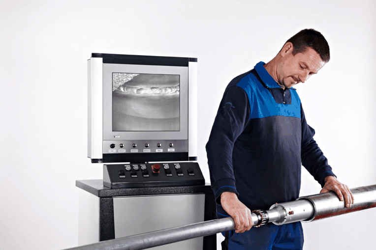 Dieser halbautomatische Rohrinnenmanipulator wird an einer Stange in das Rohr geschoben. Über eine Kamera werden Bilder aus dem Rohrinneren auf den Bildschirm des Bedieners übertragen.